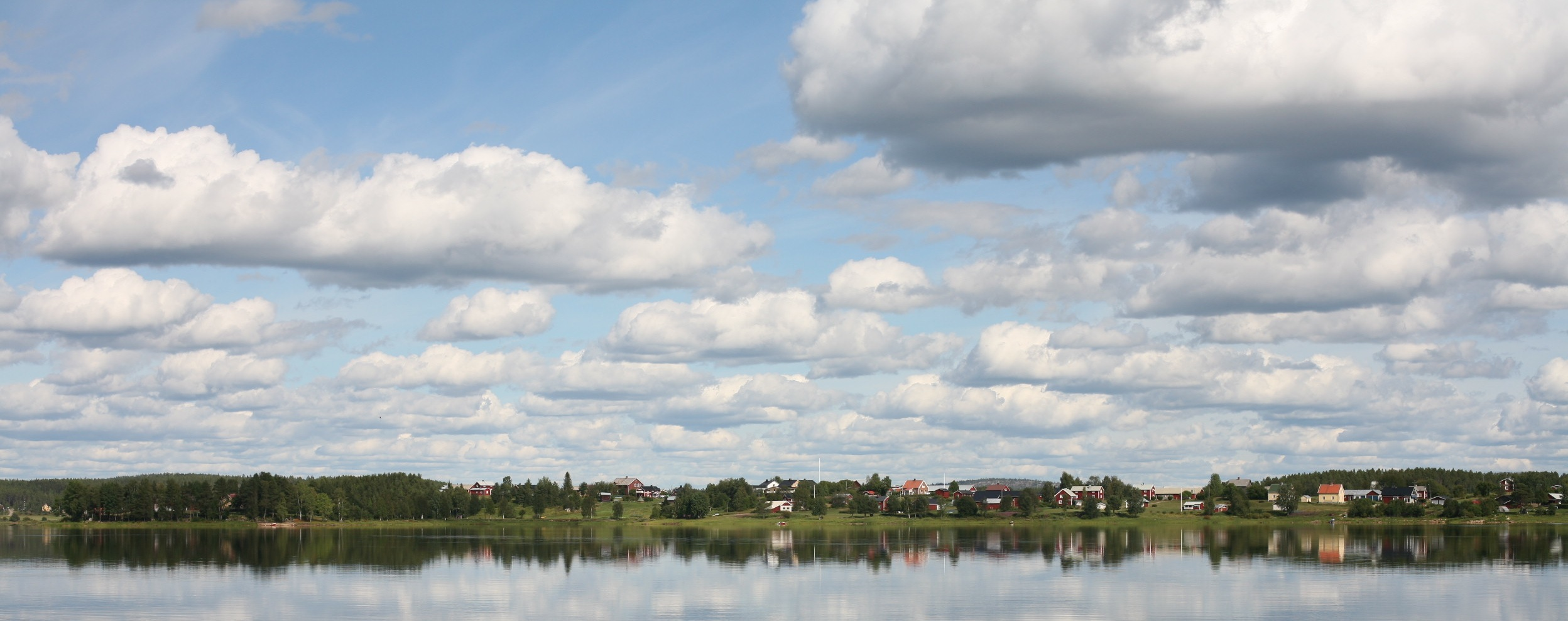 Övermorjärv från Kalix Älv